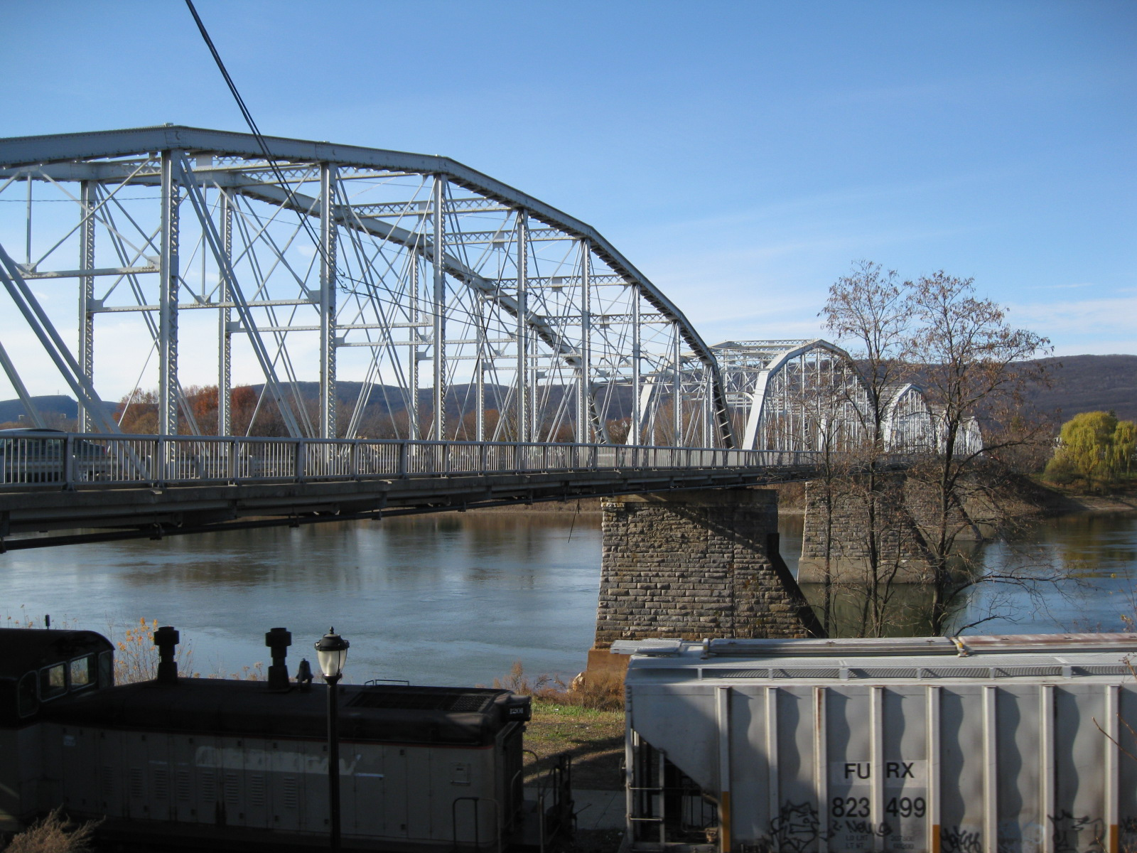 Pittston, Pennsylvania